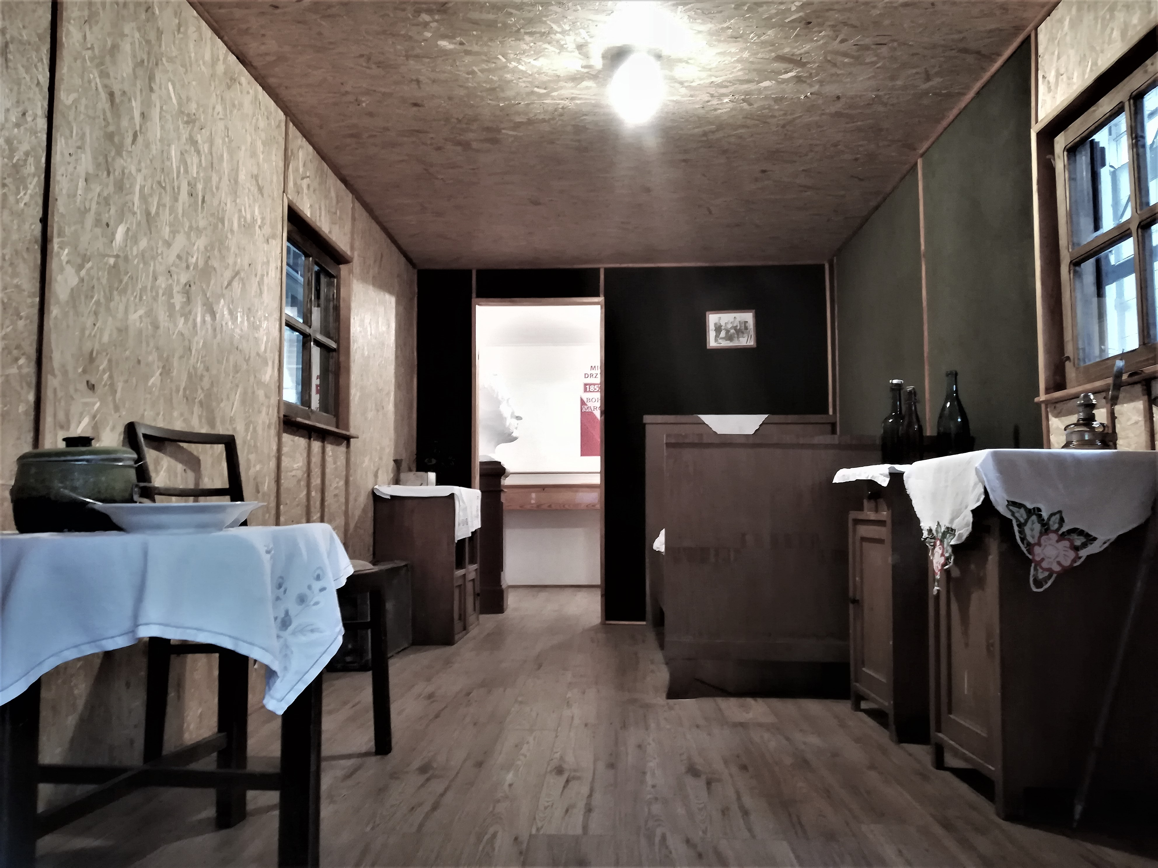 Narodowa Wystawa Rolnicza w Poznaniu na MTP z okazji 100-lecia odzyskania niepodległości. Rekonstrukcja wozu Drzymały.